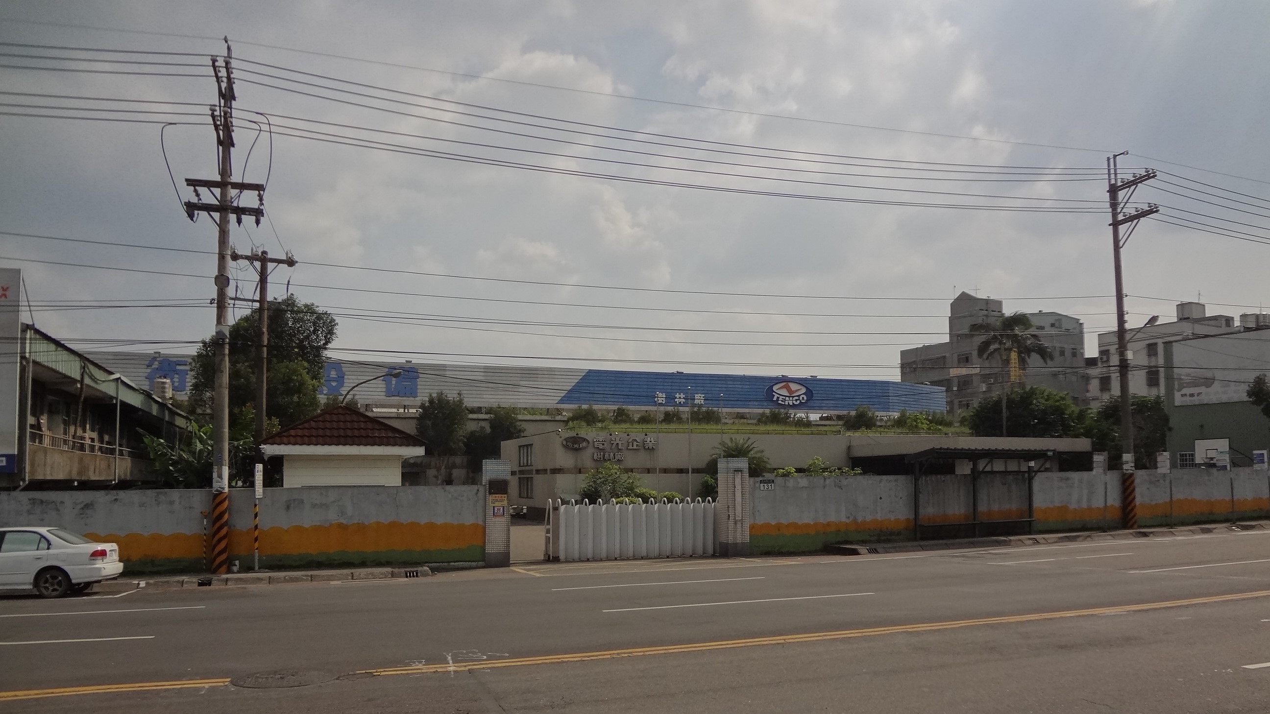 電光企業樹林廠，地址：新北市樹林區中山路二段131號。